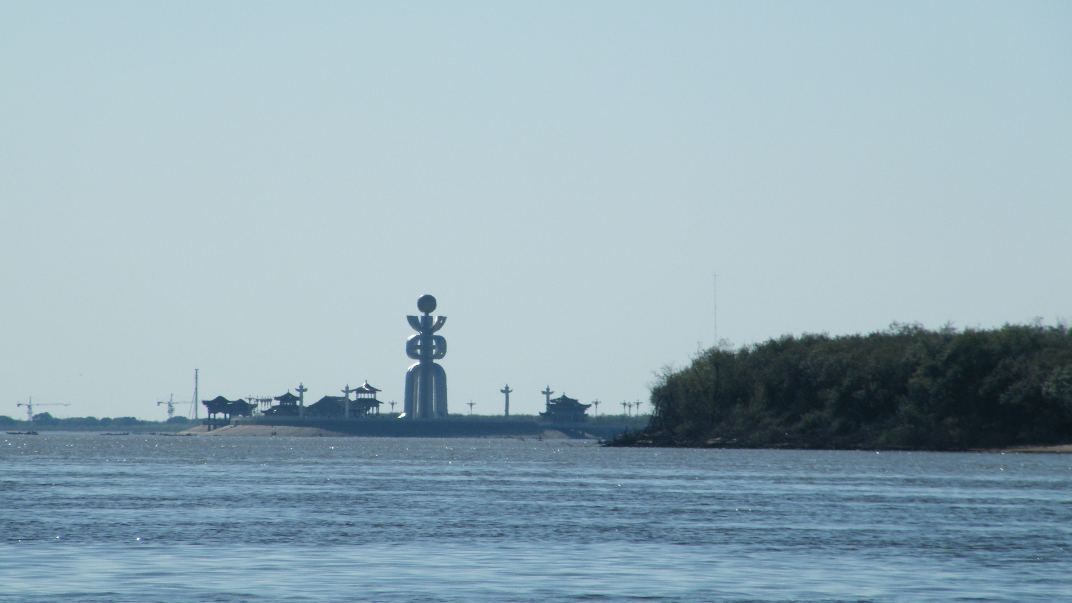 Амурская протока и село Казакевичево сент 2014